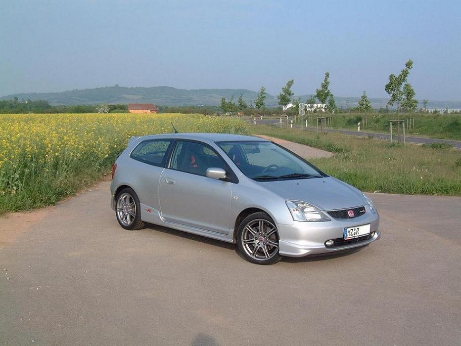 Honda Civic Type R (EP3)